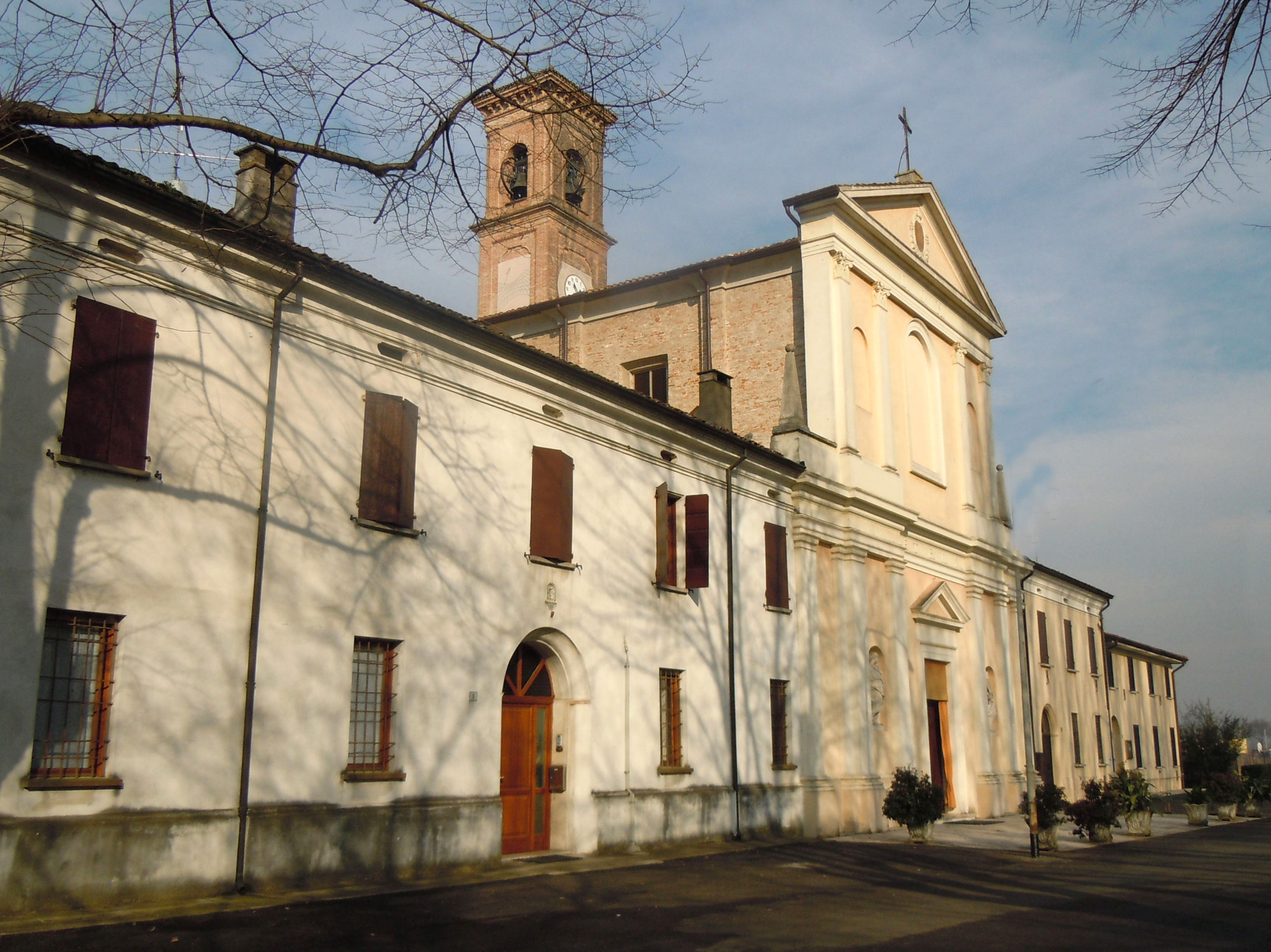 Casatico di Marcaria, Chiesa parrocchiale intitolata all'Annunciazione della Beata Vergine Maria.